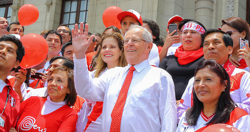 El presidente PPK, celebrando el empate ante Argentina